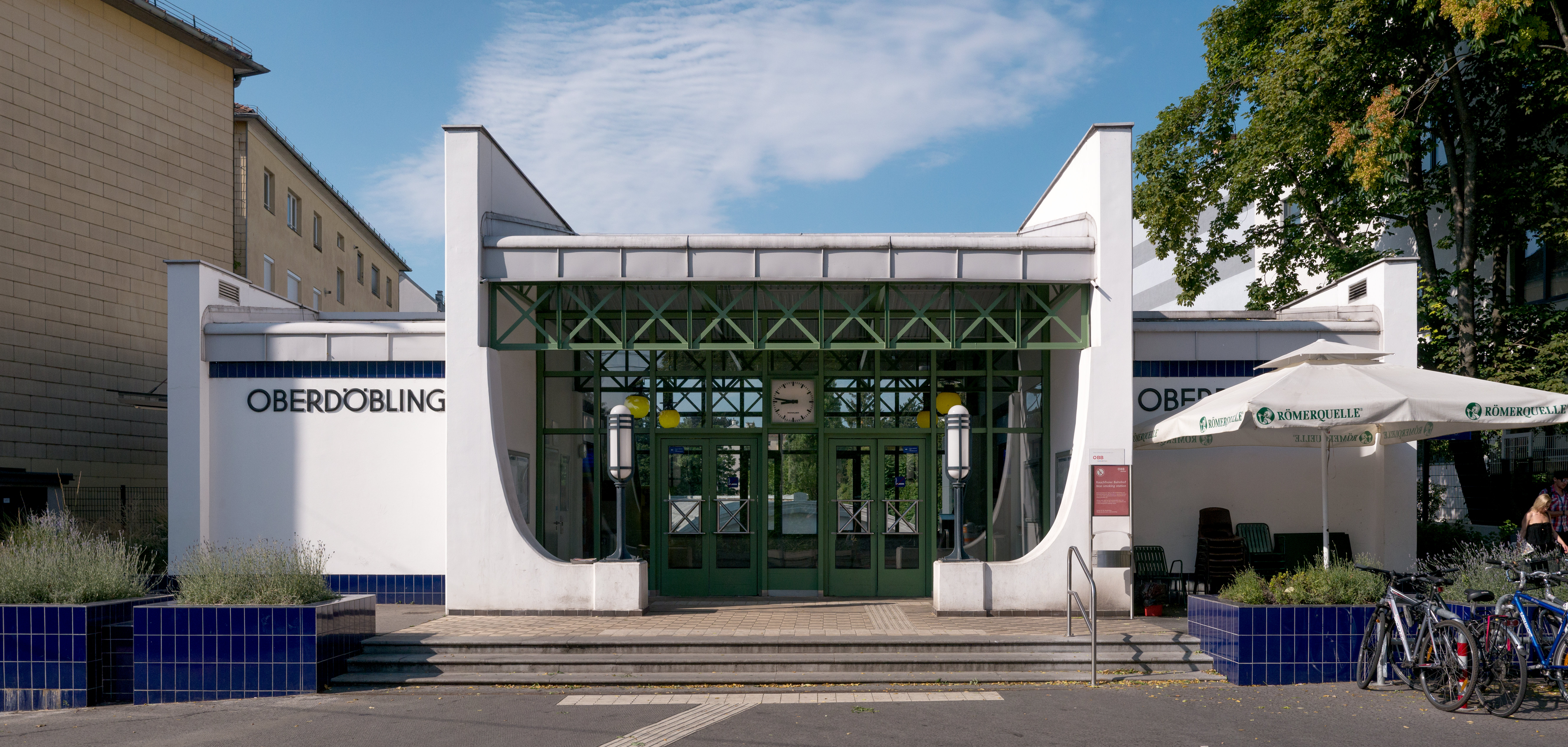 S-Bahn-Station Oberdöbling von Alois Machatschek, 1987. Inspiriert von Bauten Otto Wagners. vgl Offenbar angelehnt an dieses Gebäude